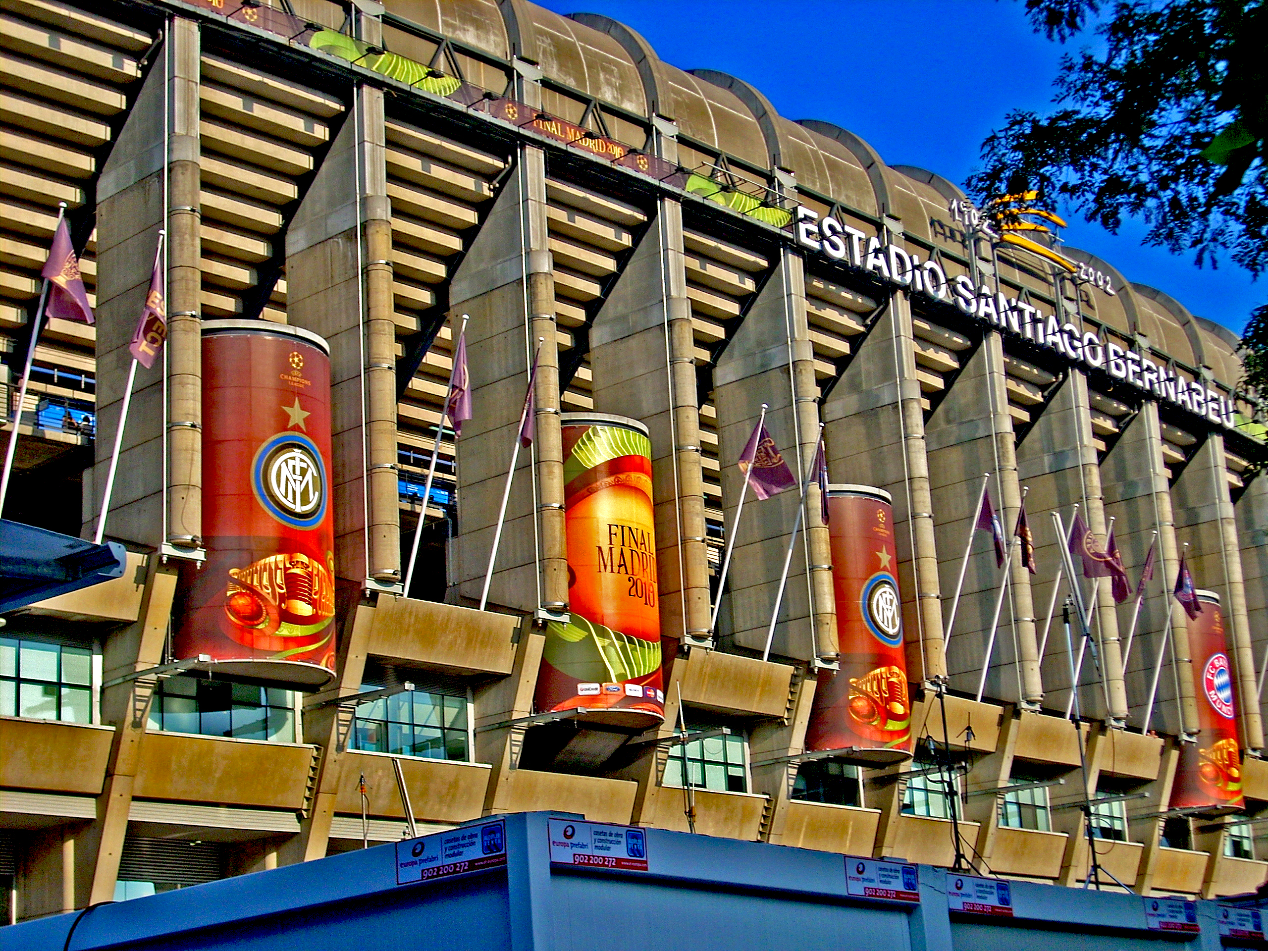 Ultima fermata dell'avventura nerazzurra in Champions League 2010. Coronata, ovviamente, con un trionfo.